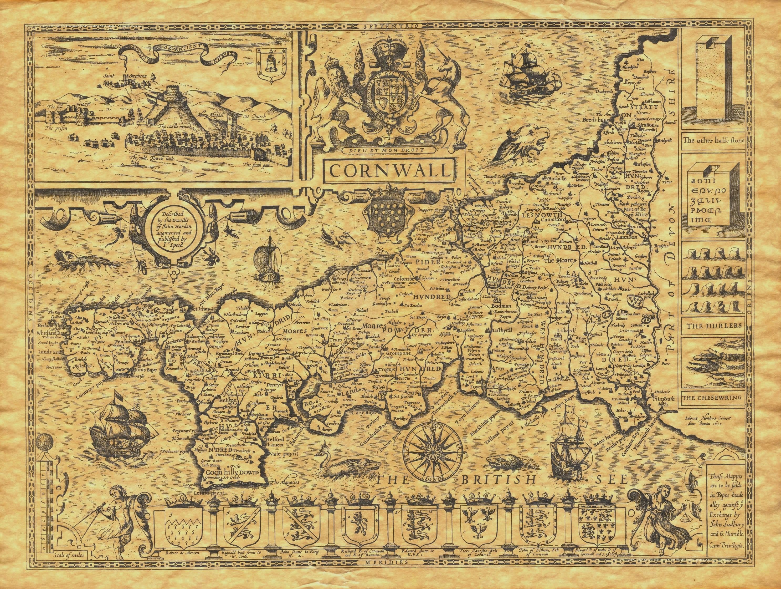 Une carte de la Cornouaille par John Speed en 1614.